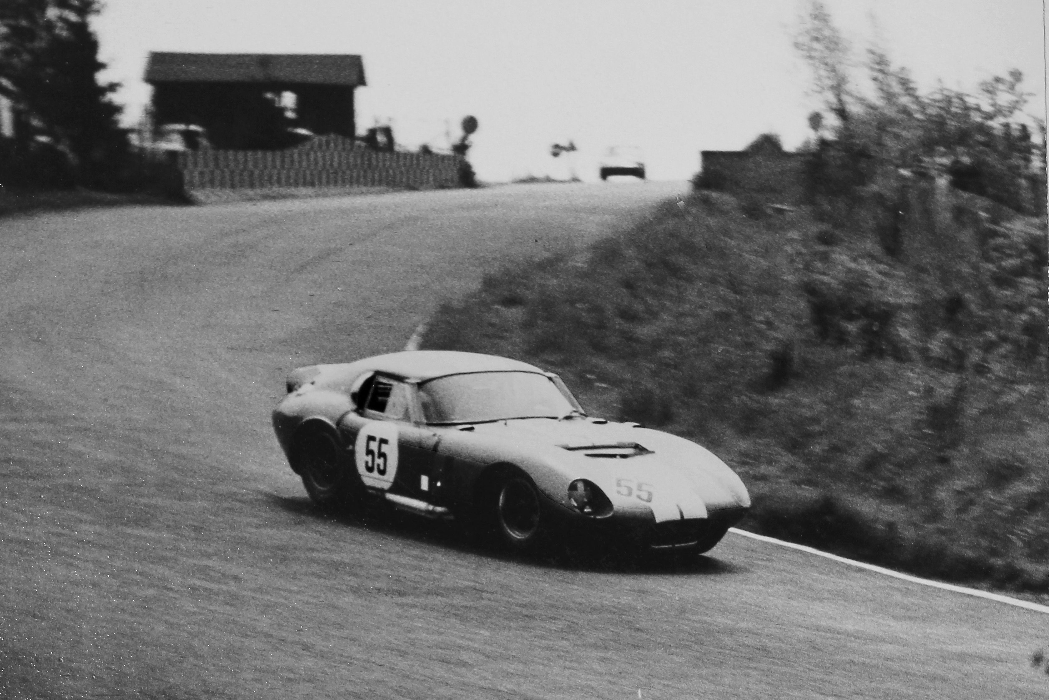 Shelby Cobra Daytona Coupé von Jack Sears/Frank Gardner beim 1000-km-Rennen auf dem Nürburgring eingangs Streckenabschnitt Hatzenbach; 10. Platz im Gesamtklassement